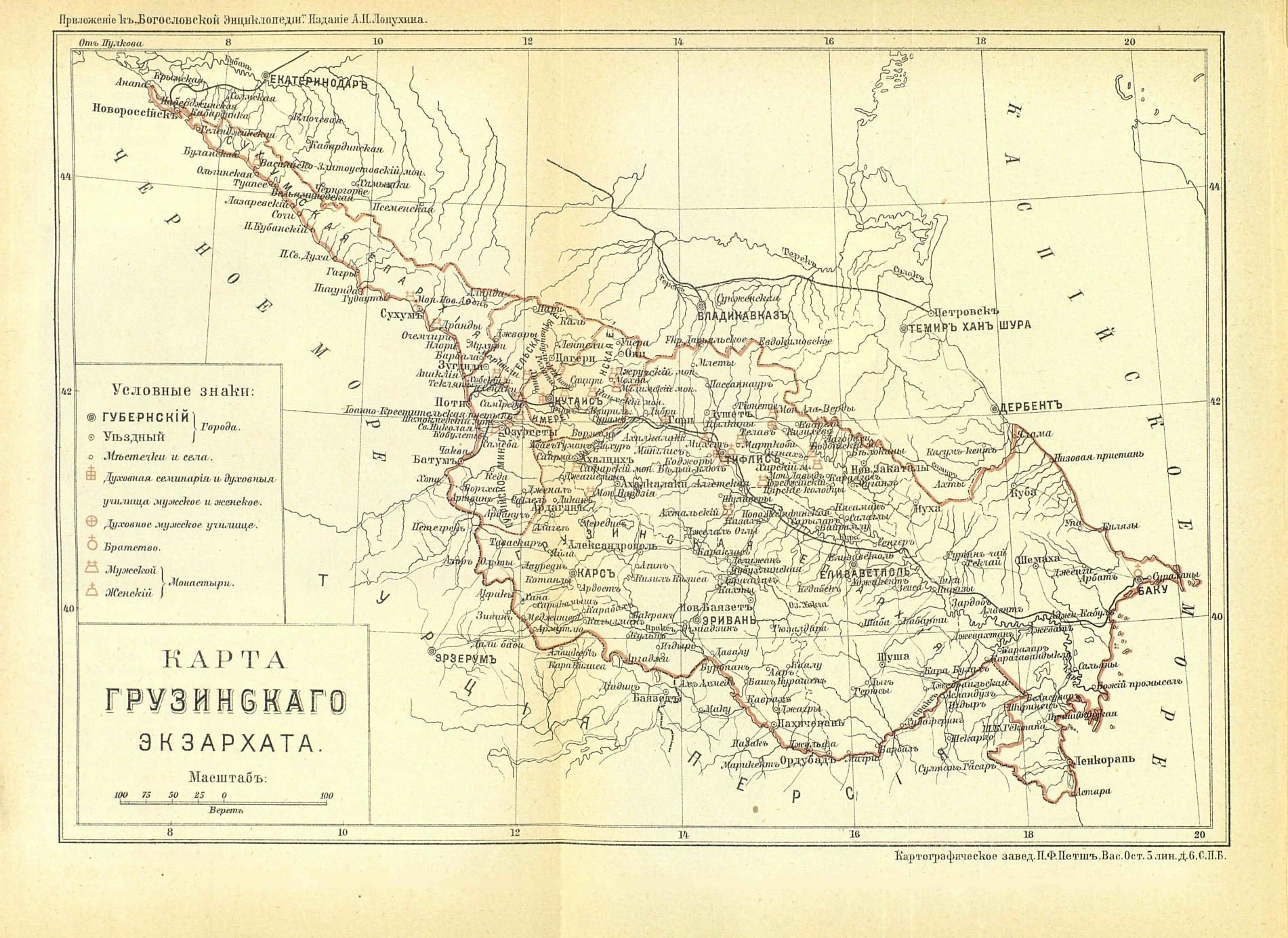 Грузинский Экзархат Святейшего Синода Православной Российской Церкви (1811 - 1917)